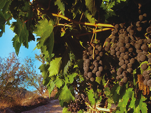 Primo piano di uva dauna dalla quale viene prodotto il vino DOC Rosso Canosa.